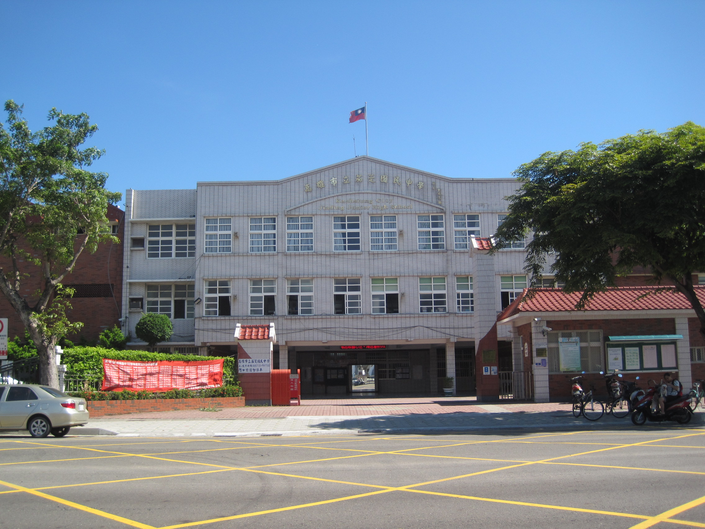 高雄市立茄萣國民中學大門。